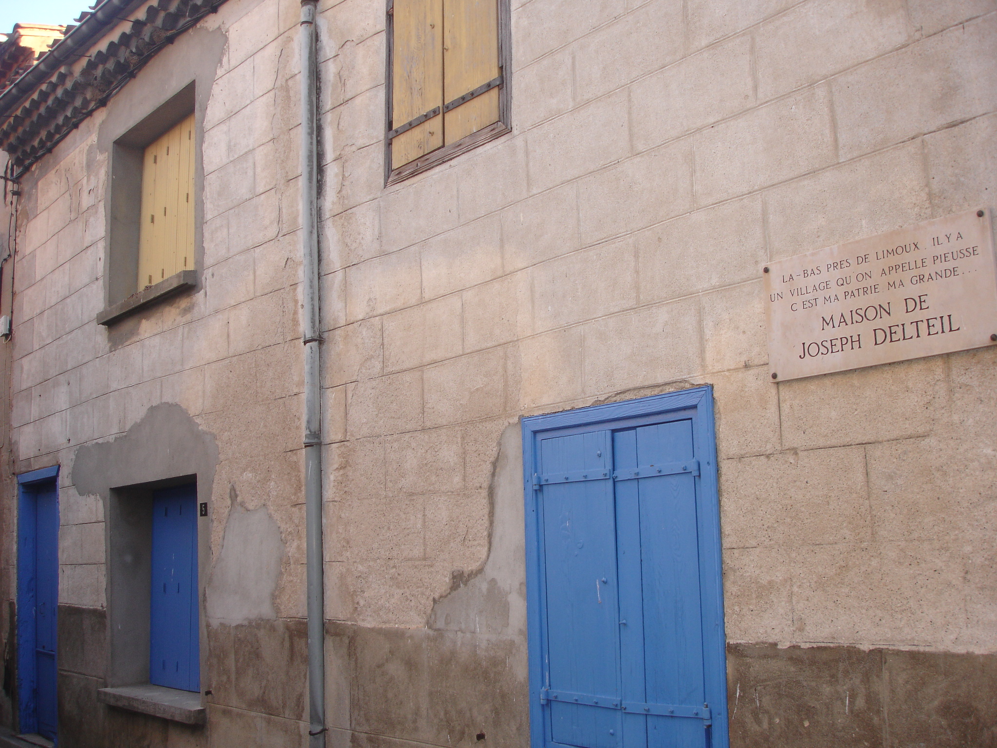 France, Aude (11), Pieusse, Maison de joseph Delteil